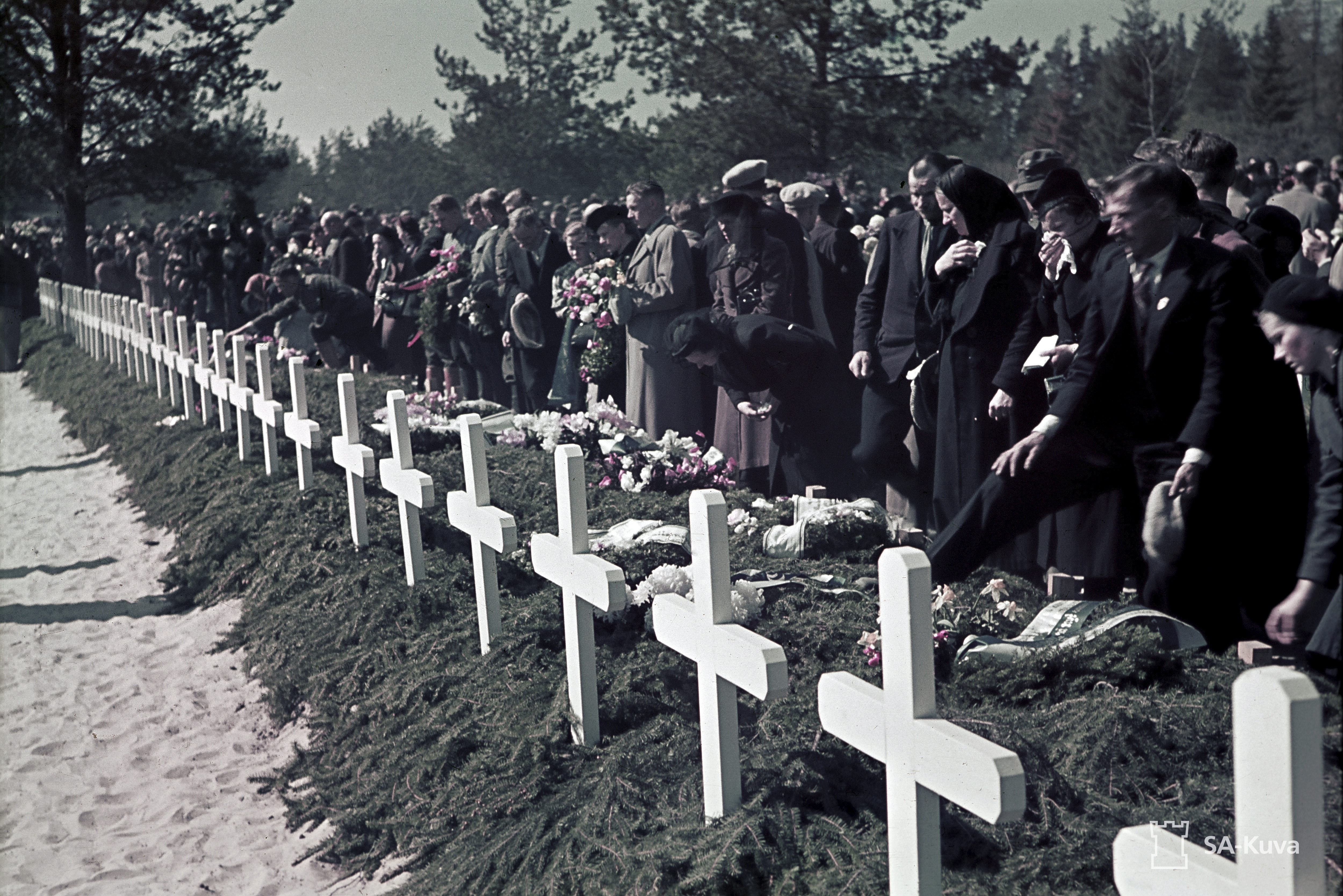 Sankarihautajaiset. Sankarivainajien muistopäivän tilaisuus Joensuussa 19.5.1940.